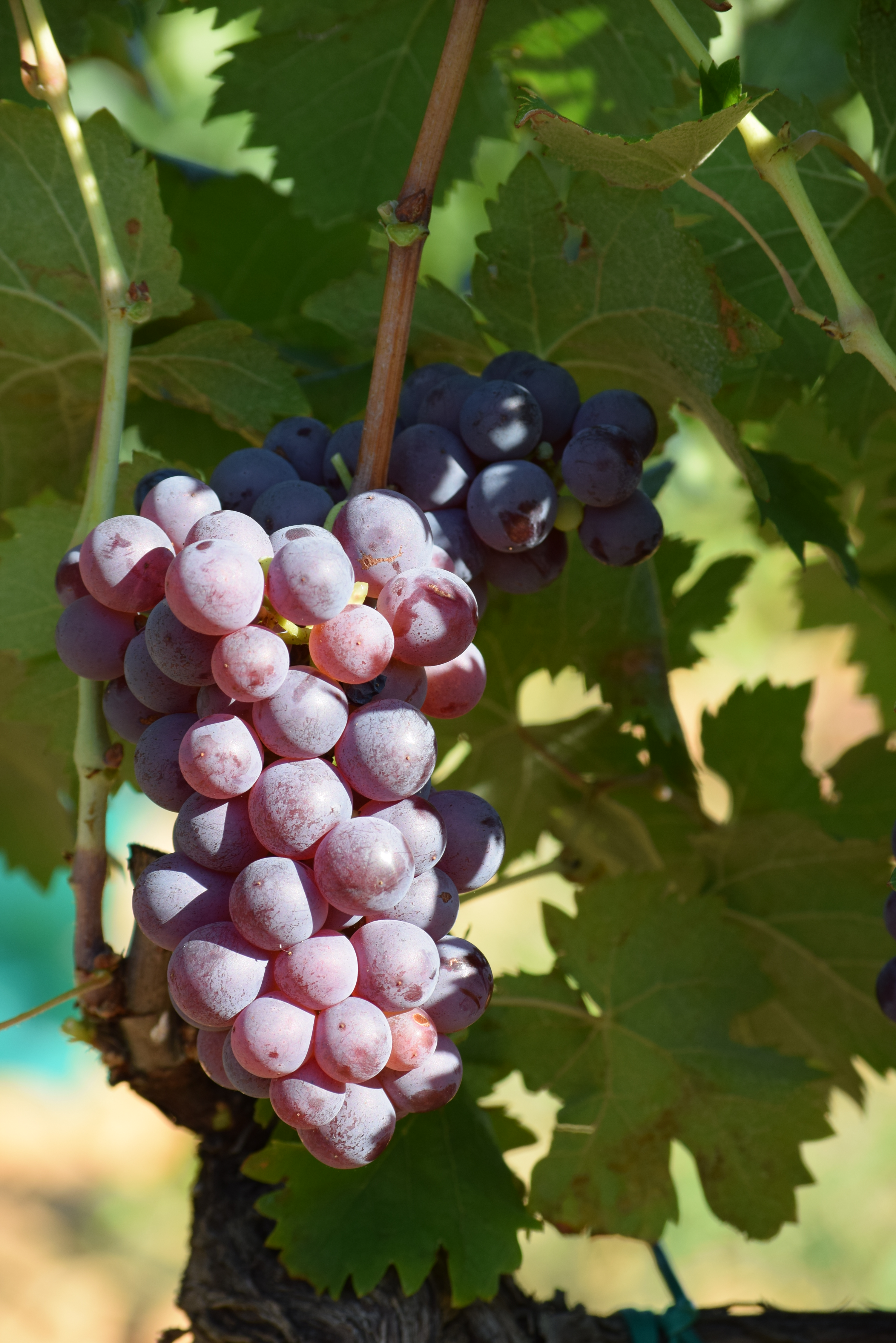 grappe de Calitor, cépage local méditerranéen Photo prise en 2018 à Châteauneuf-de-Gadagne, Vaucluse (France)